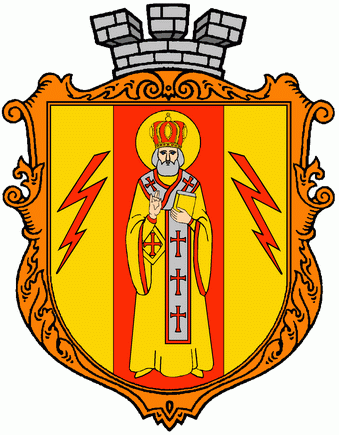 Герб міста Миколївка